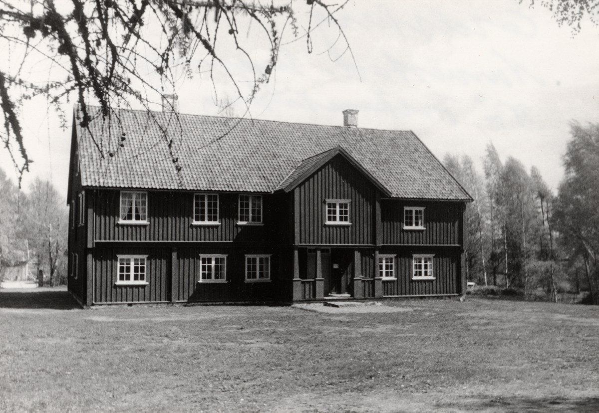 Narvestad, Folkenborg museum, Eidsberg